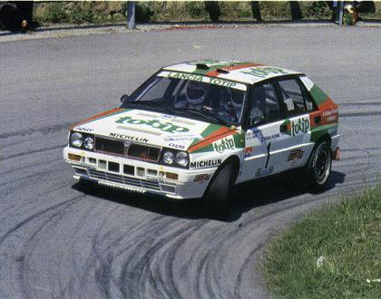 Il pilota italiano Dario Cerrato su Lancia Delta del Jolly Club alla Targa Florio del 1989.